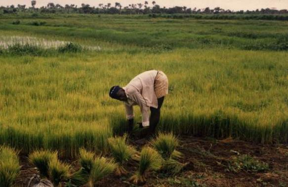 Rice farming, Rolako, Bombali district, Sierra Leone